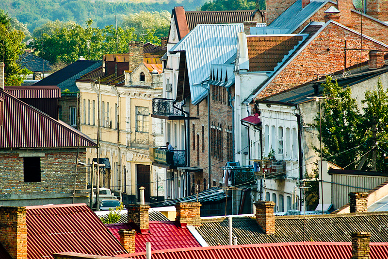 Drahomanov street